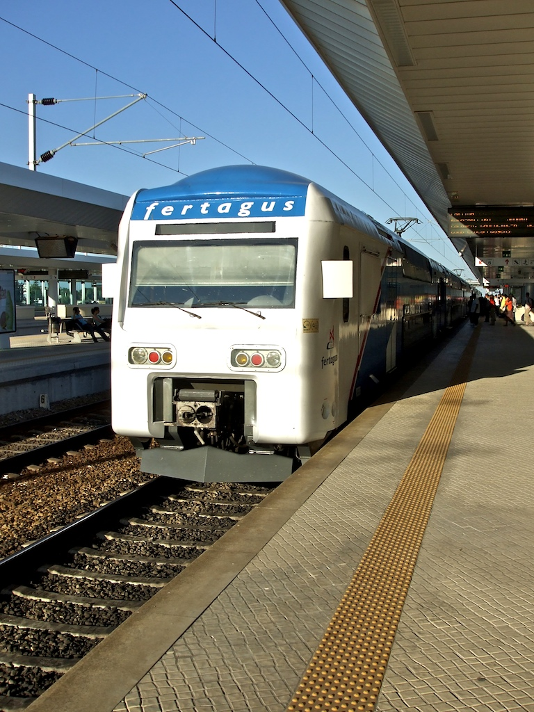 Tipo: Comboio Suburbano [Setúbal - Roma • Areeiro] Local: Estação de Pinhal Novo [Linha do Sul, PK 37 • Linha do Alentejo, PK 15] Data e hora: 9 de Julho de 2008 [19h40] Material: Automotora 3506 [Unidade Quádrupla Eléctrica]